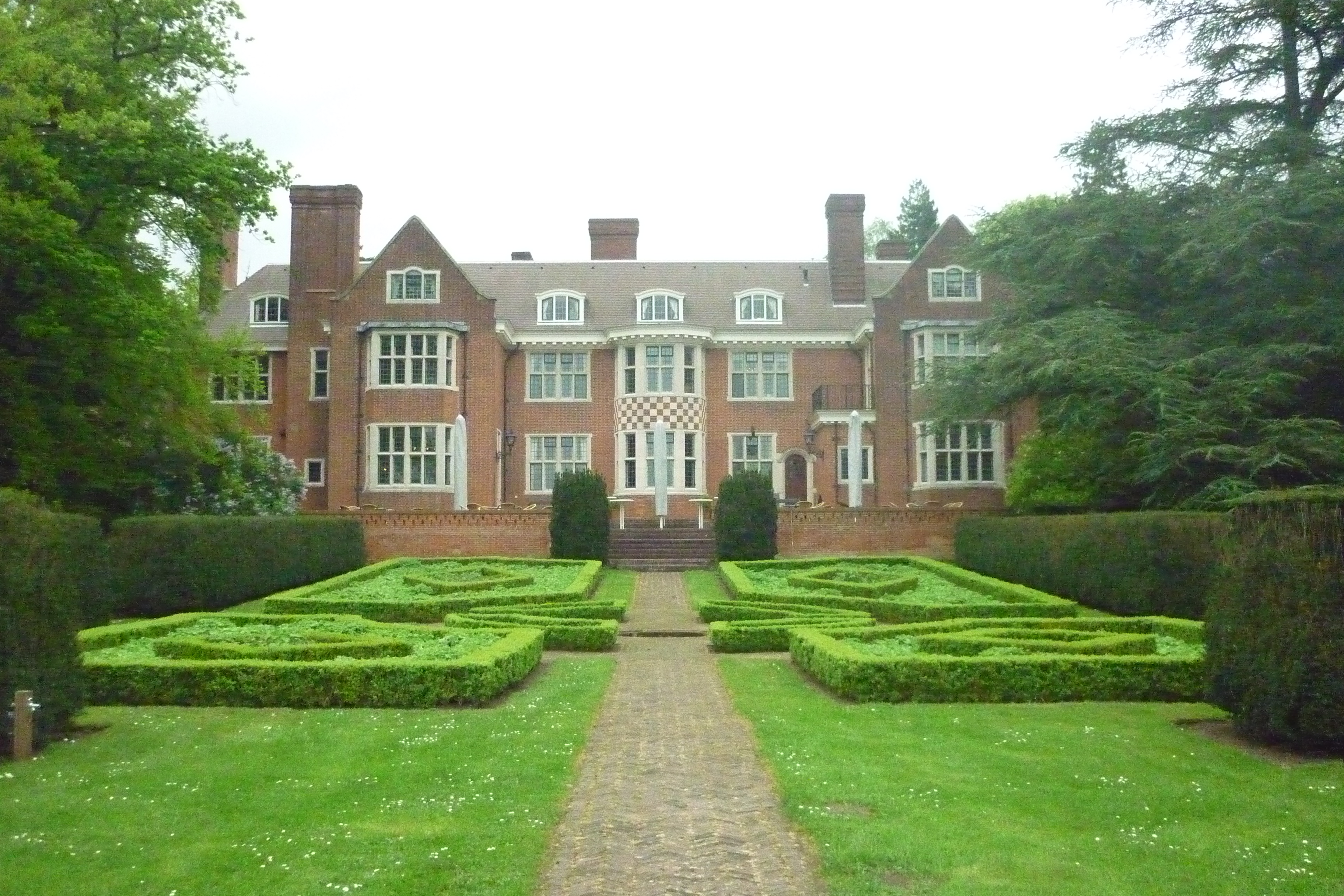 Achterkant van De Zwaluwenberg. Het gebouw zelf vormt rijksmonument 522747, de tuin 522856.